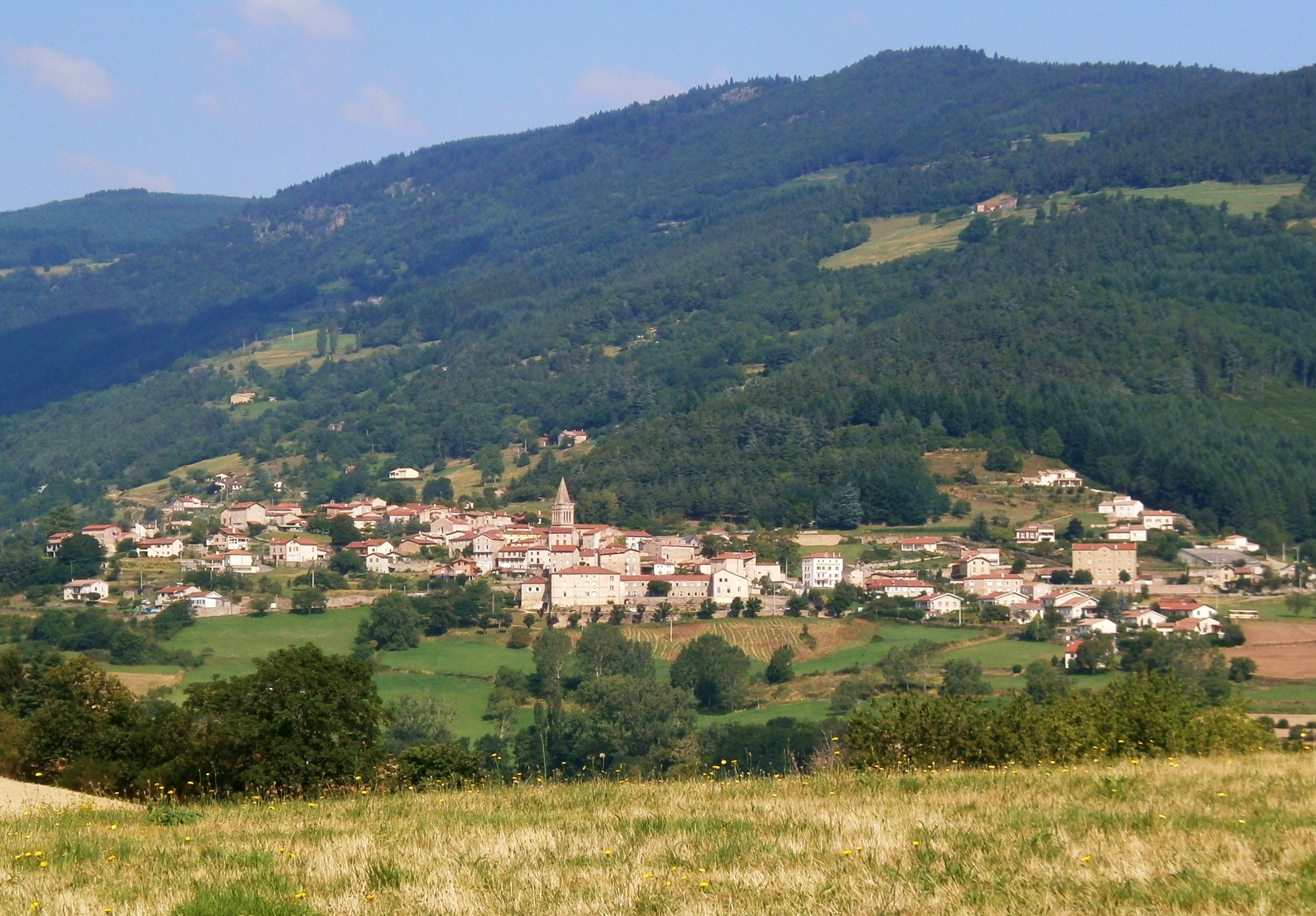 Vue générale du village de Vanosc, juillet 2014